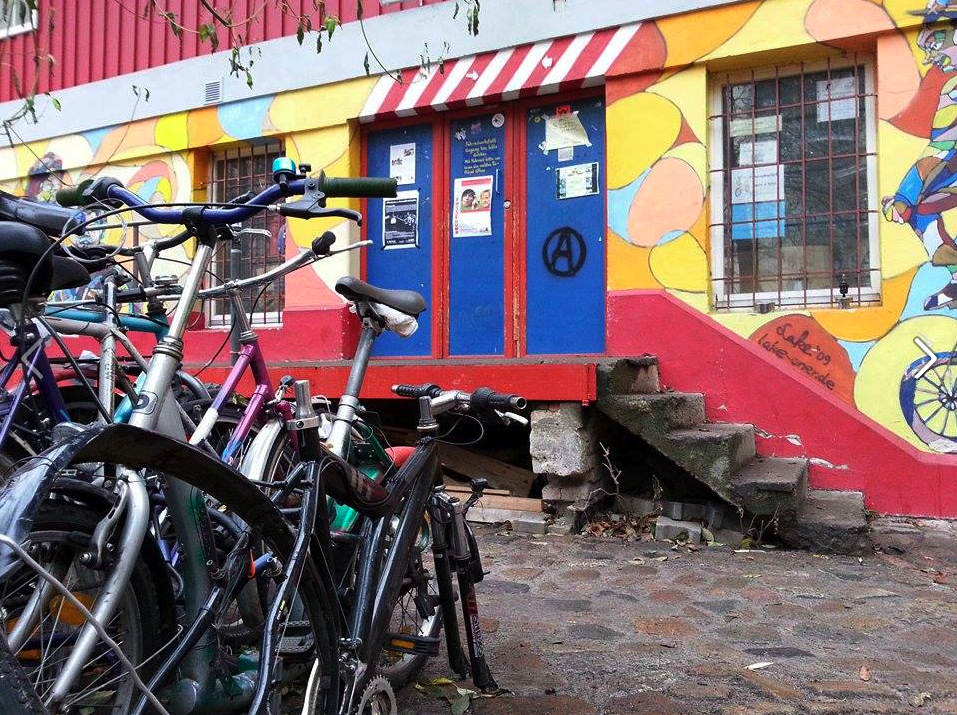 Regenbogenfabrik (Fahrradwerkstatt) - 1981 besetztes und heute legales Alternativprojekt in Berlin-Kreuzberg, Germany